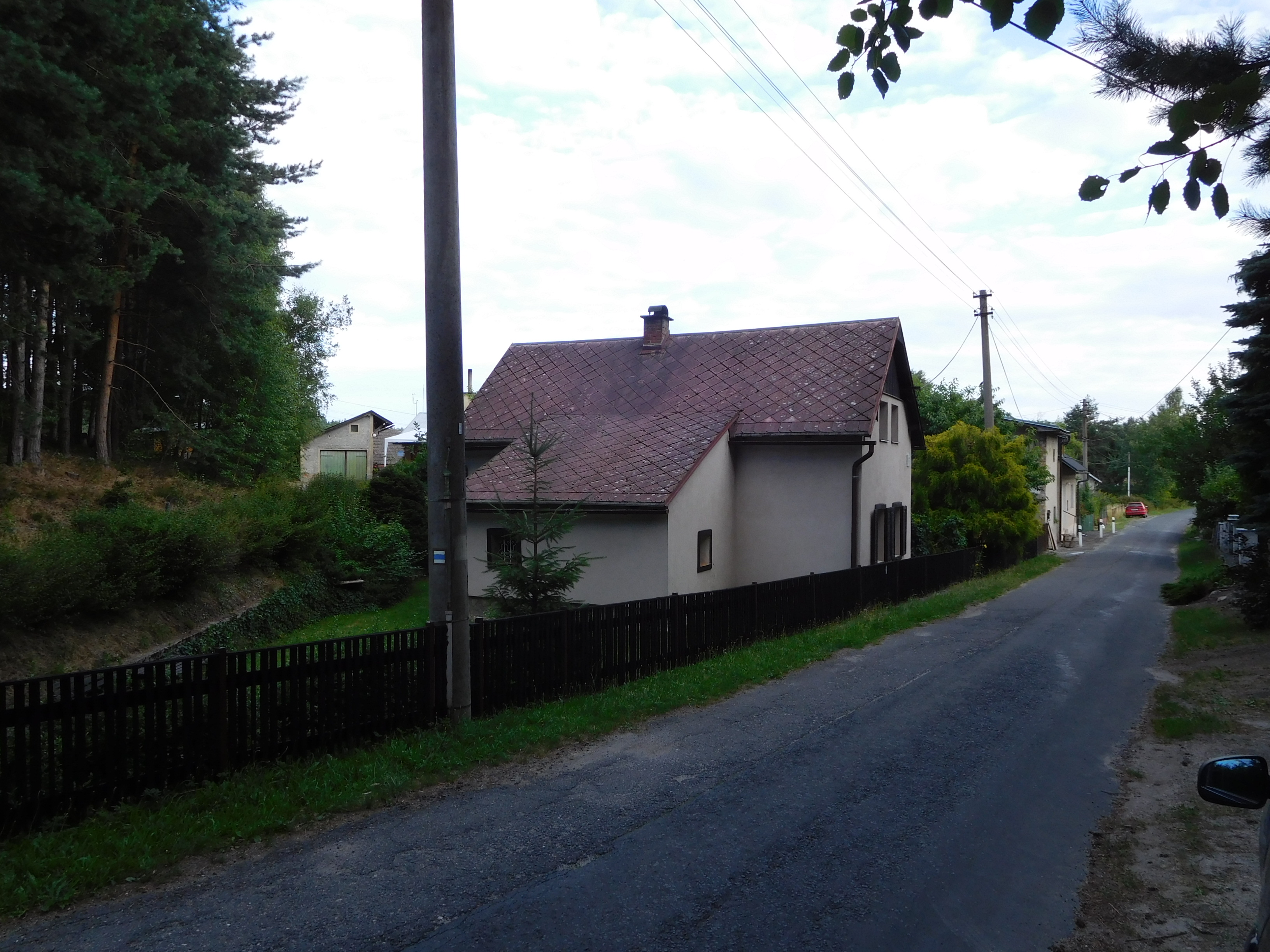 Horky - č.p. 2